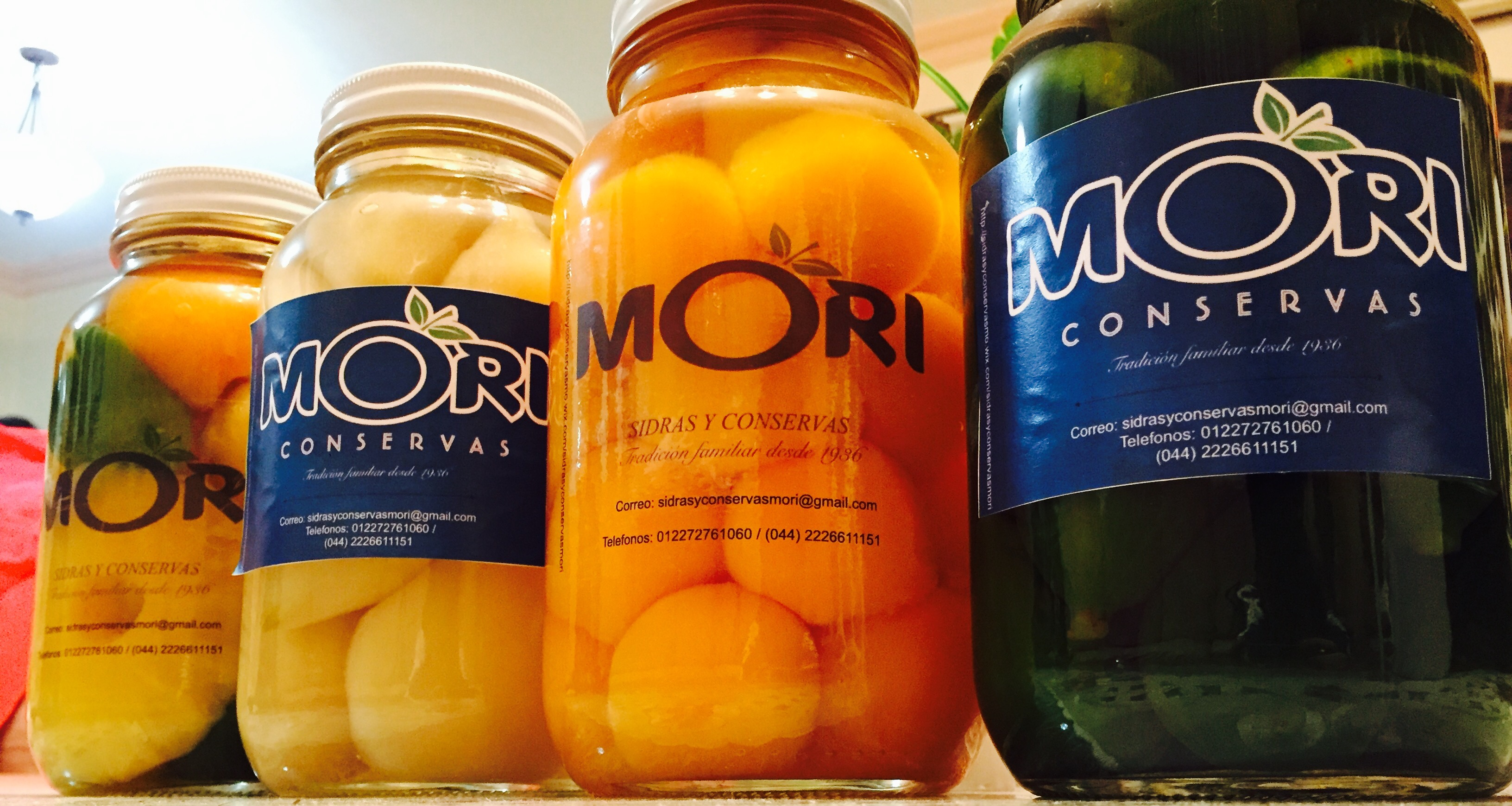 Conservas Mori